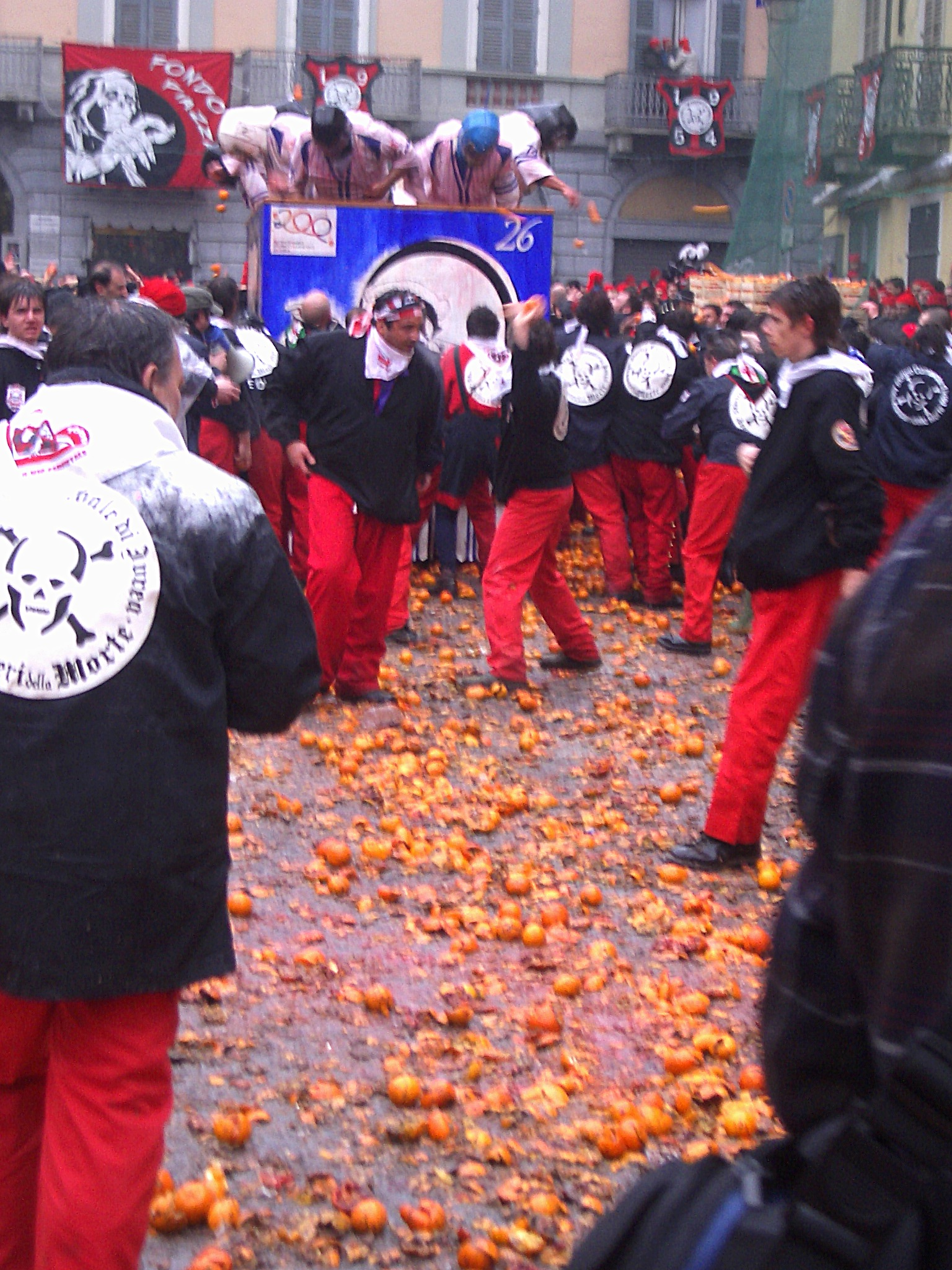 Carnival of Ivrea, Battaglia delle arance (Orange-battle)